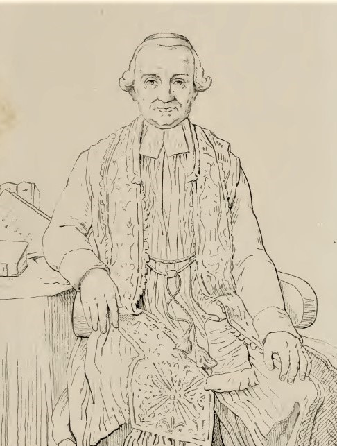 Portrait de Claude-Marie Marduel, curé de Saint-Roch à Paris de 1787 à 1833, réalisé en 1818 par P.-L. de Laval à la demande des marguilliers de la paroisse.